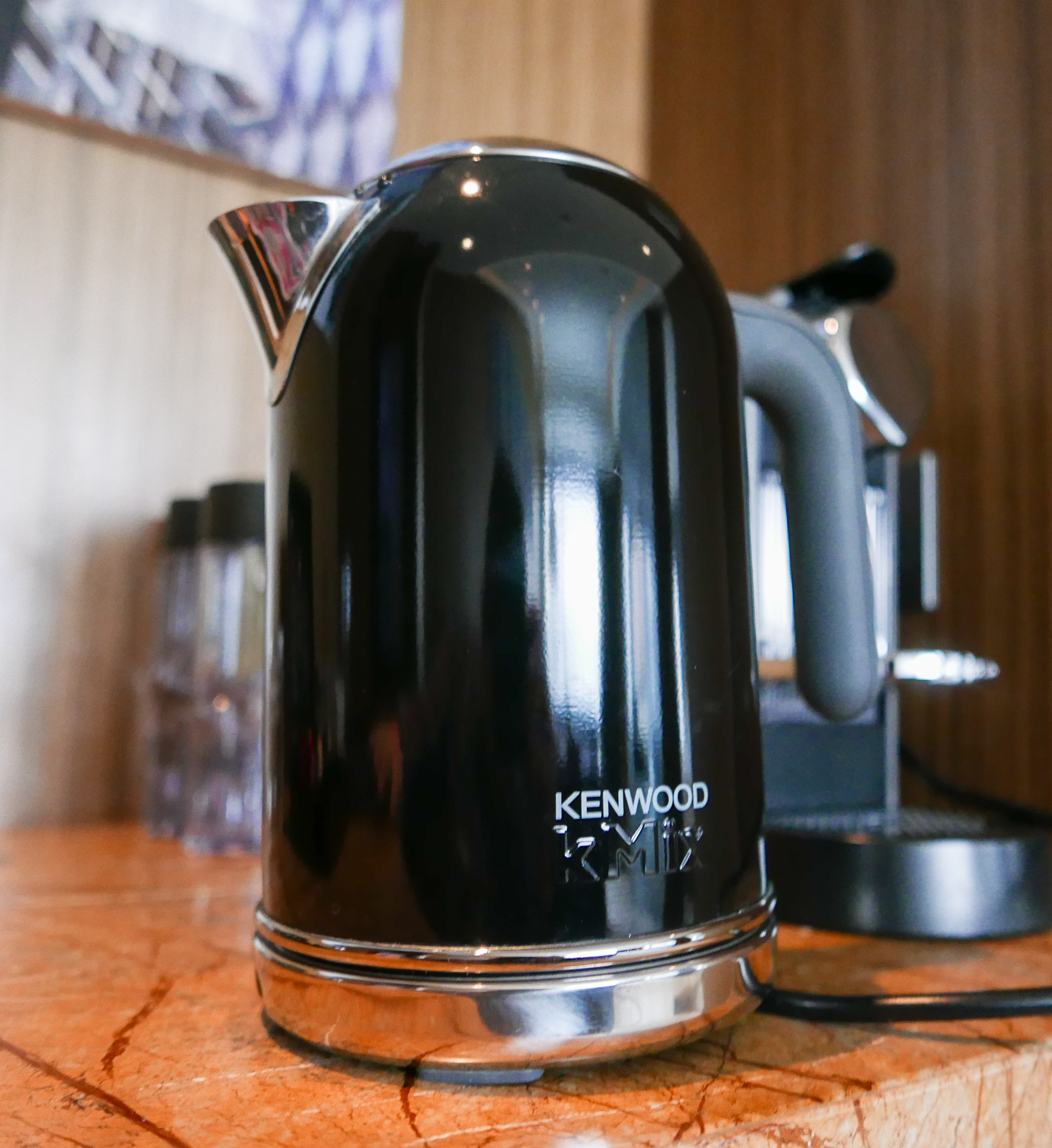 KENWOOD kMix Jug Kettle